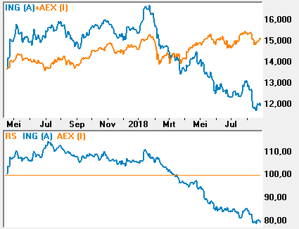 Relatieve Sterkte ING t.o.v. AEX. Boven: overlay met indexatie. Beneden: AEX=100% lijn